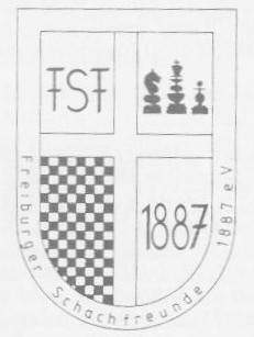 Logo der Freiburger Schachfreunde 1887 e.V.